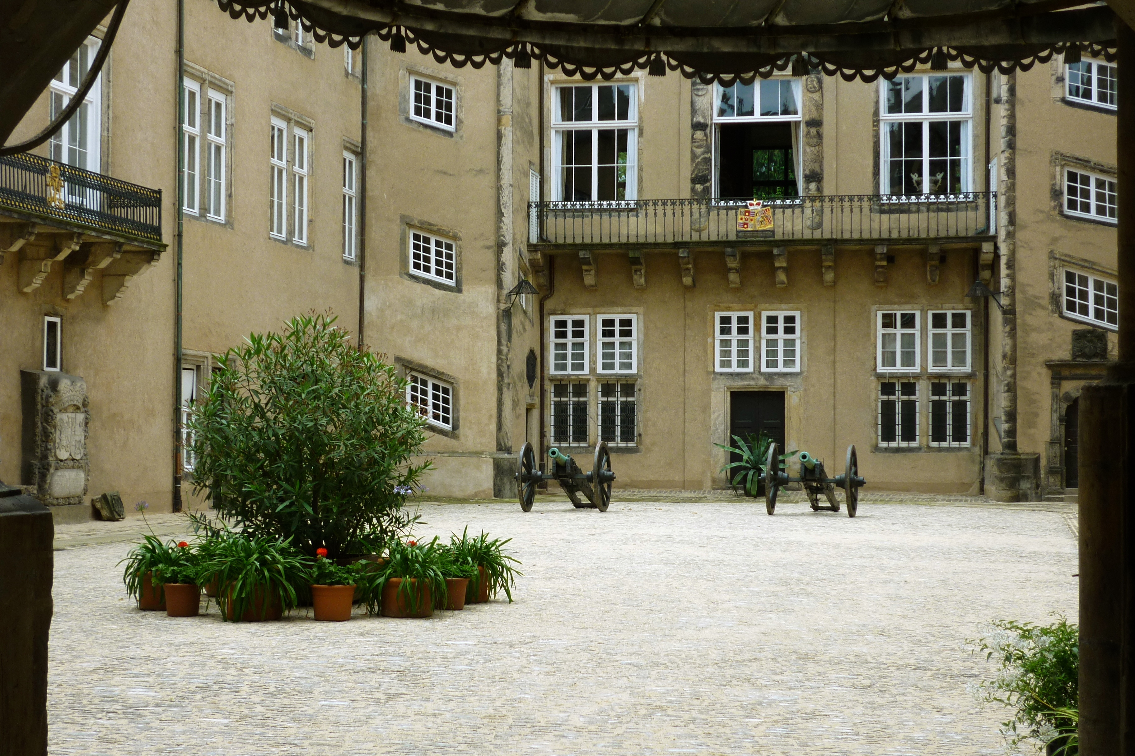 Detmold. Blick in den Innenhof des fürstlichen Residenzschlosses. Erkennbar sind zwei Treppenhäuser (-türme).